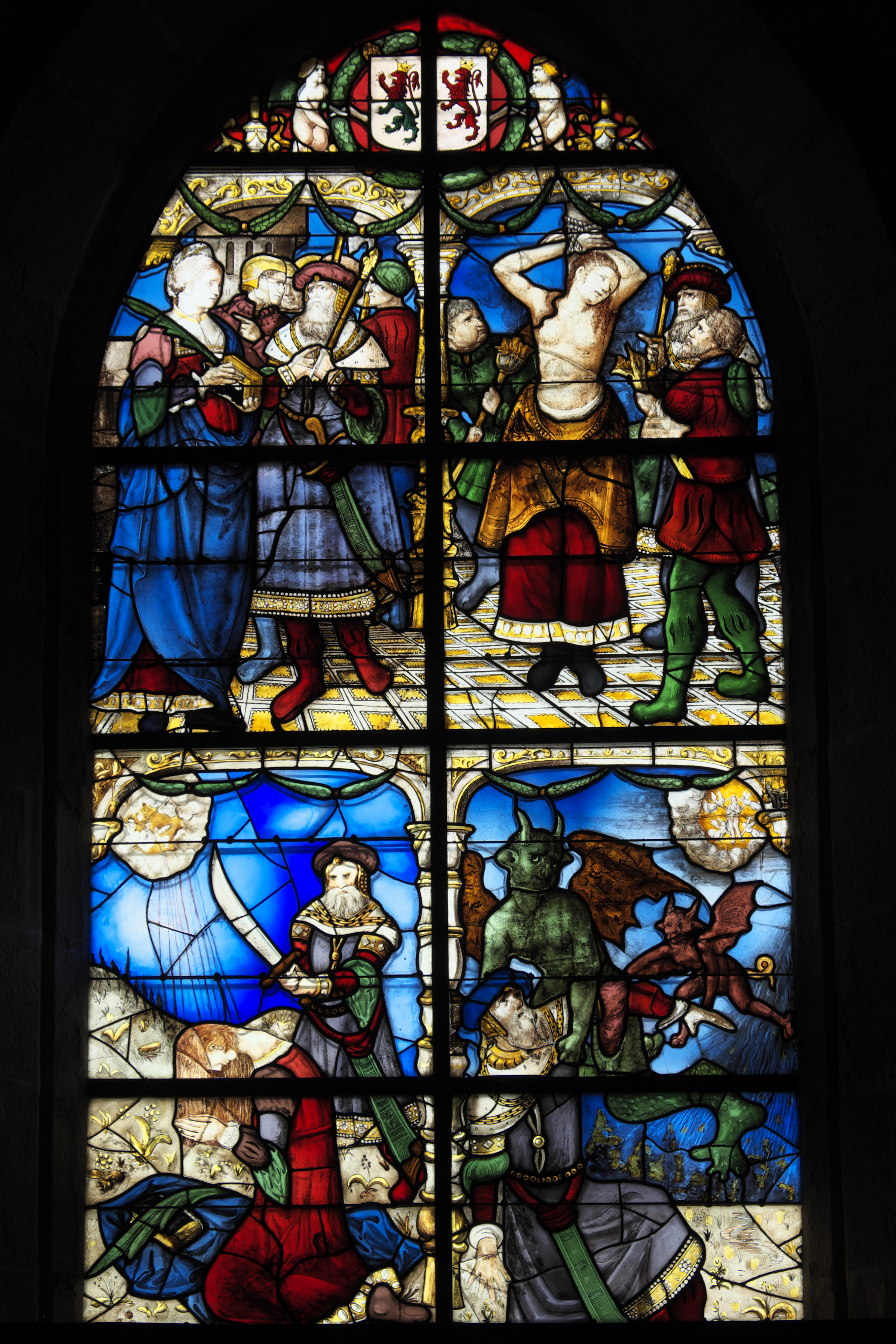 Fenster des Martyriums der heiligen Barbara (Baie 1) in der Kirche Sainte-Marie-Madeleine, der ehemaligen Stiftskirche Notre-Dame, in Champeaux im Département Ille-et-Vilaine (Region Bretagne/Frankreich), Bleiglasfenster aus der Mitte des 16. Jahrhunderts; im Maßwerk: Wappen der Stifterfamilie Epinay